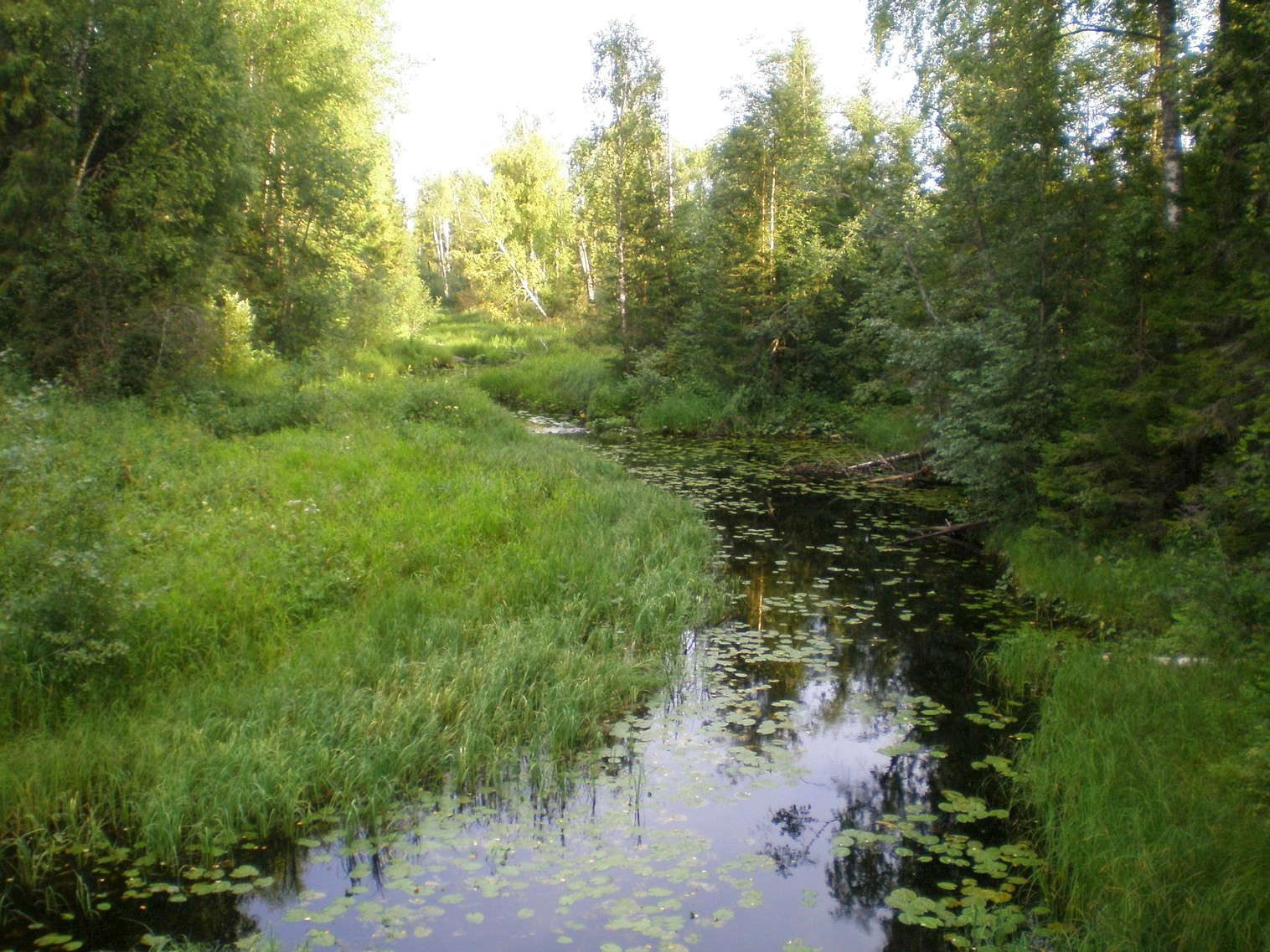 Верхняя Кизьма